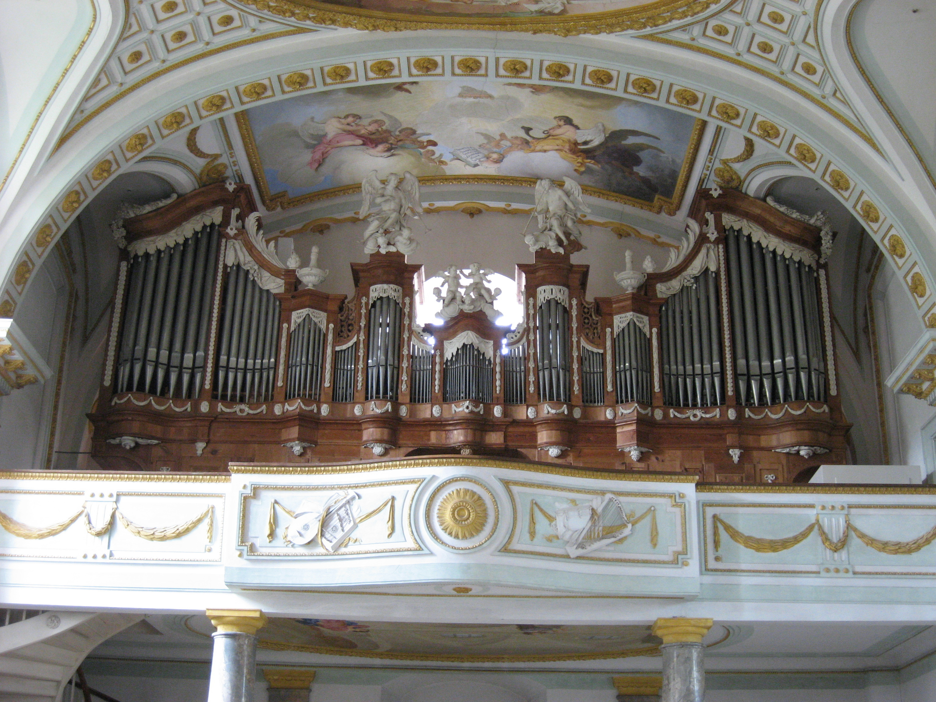 Kloster Triefenstein. Orgel; sie wurde 1790 von Franz Zettler erbaut, 1990 von Steinmeyer restauriert und verfügt über 27 Register auf zwei Manualen